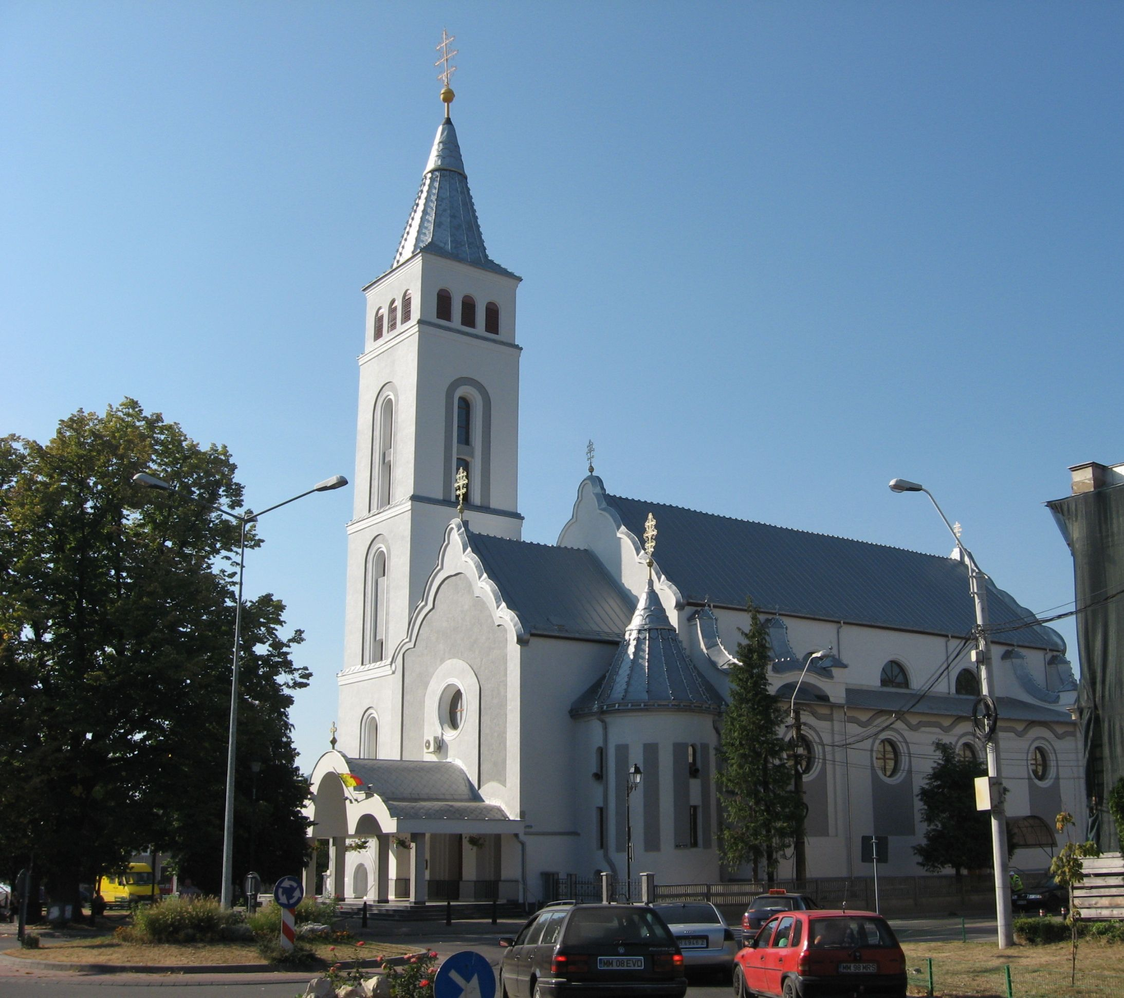 Aceatsa e o imagine cu un monument istoric din Romania clasificat cu numarul MM-II-m-B-04471.